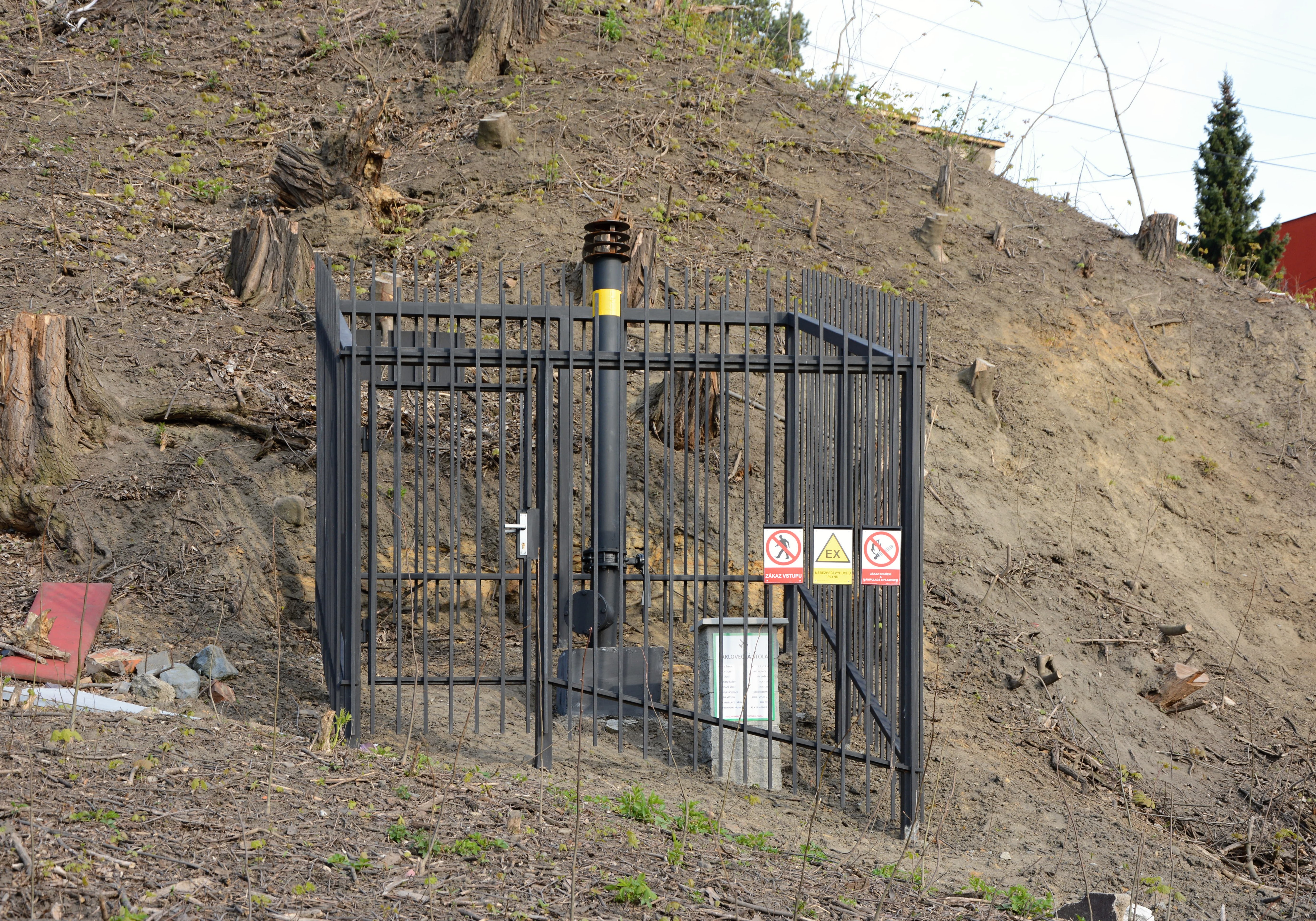 Ústí Jaklovecké dědičné štoly, Slezská Ostrava